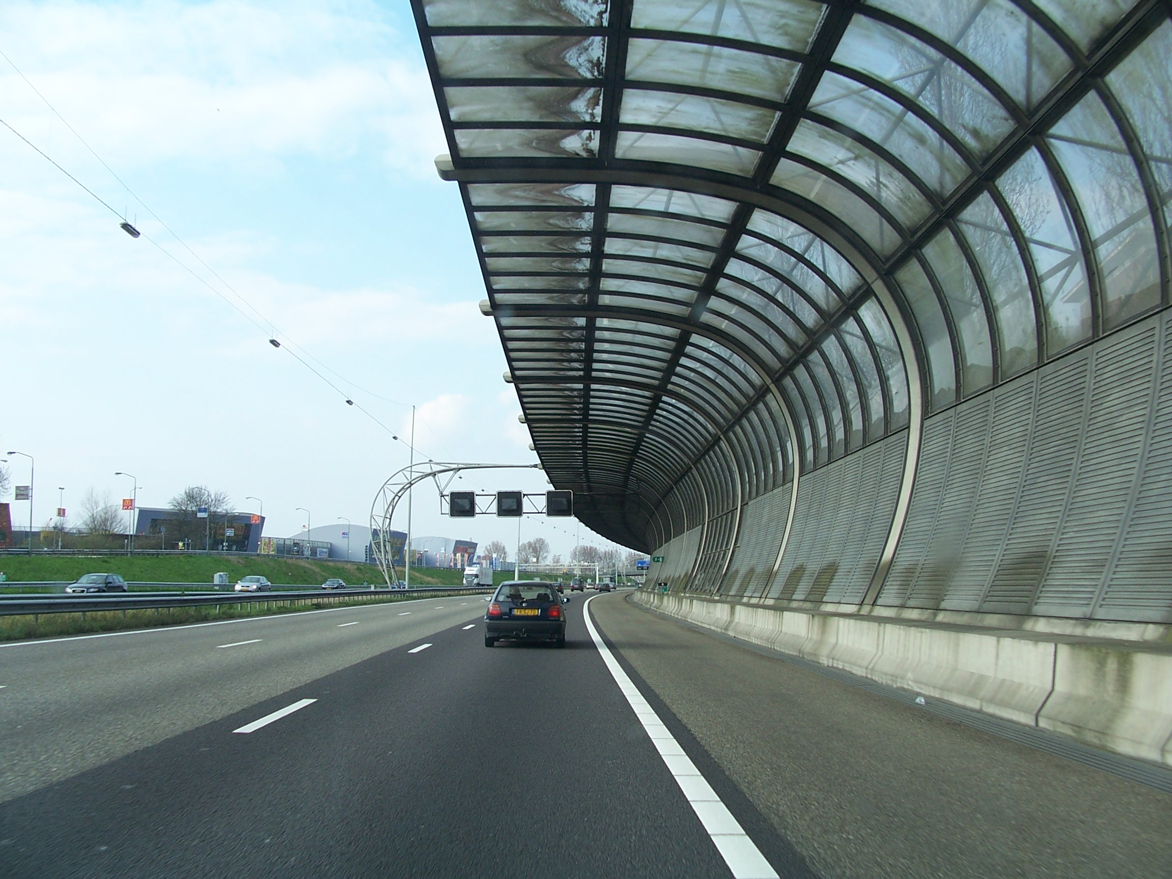 Barriere antirumore ai lati di un'autostrada olandese nei pressi di Dordrecht.